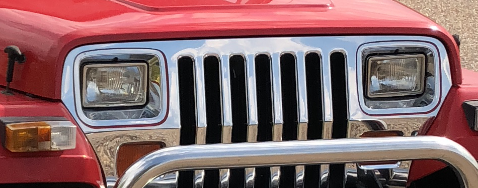 Calandre de la Jeep Wrangler YJ (modèle de 89)